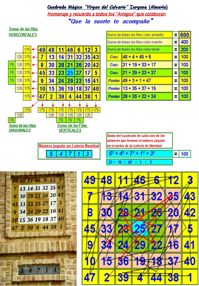 cuadrado magico zurgena